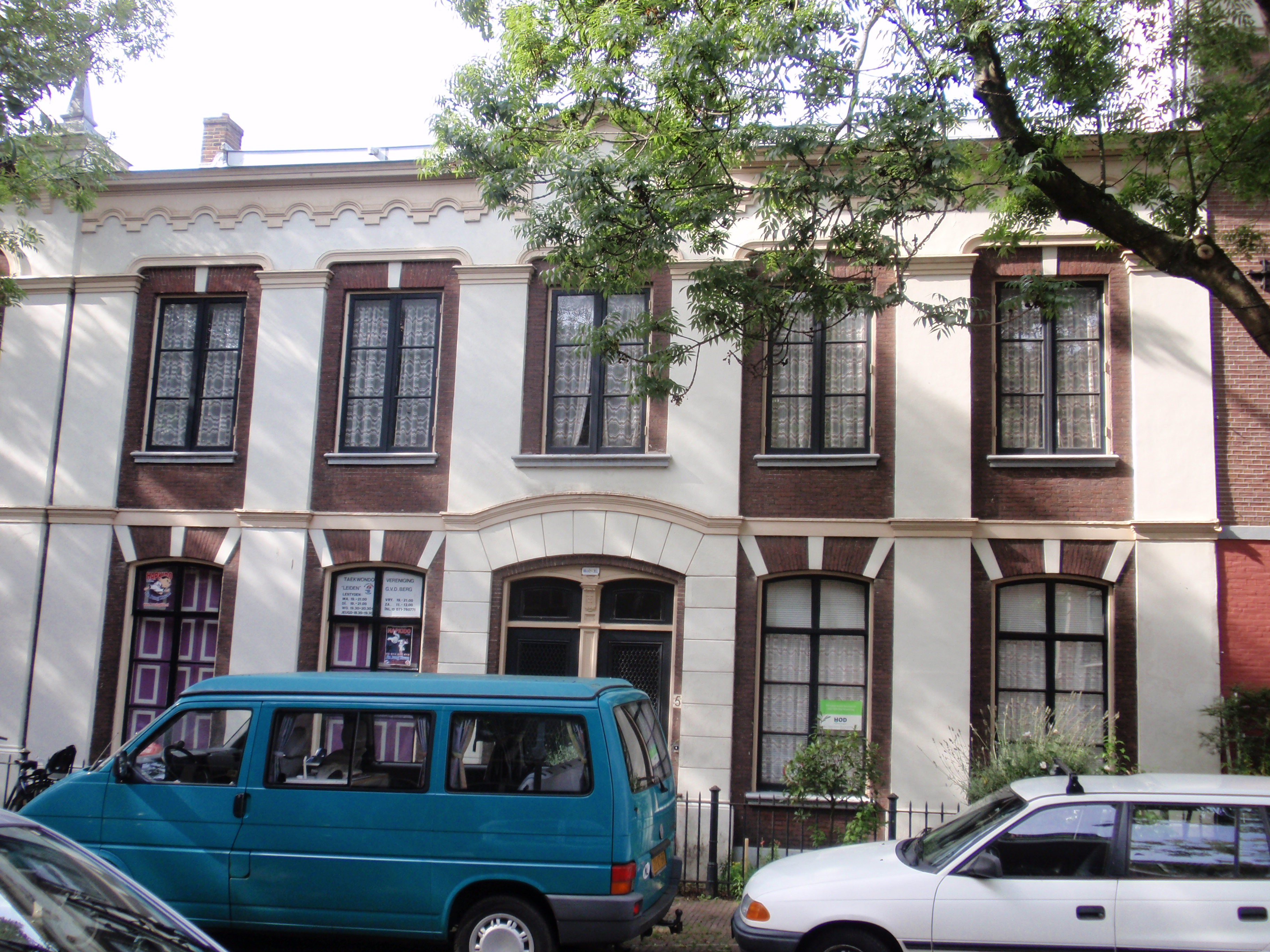 Foto uit Leiden tijdens rijksmonumentendag 2010.